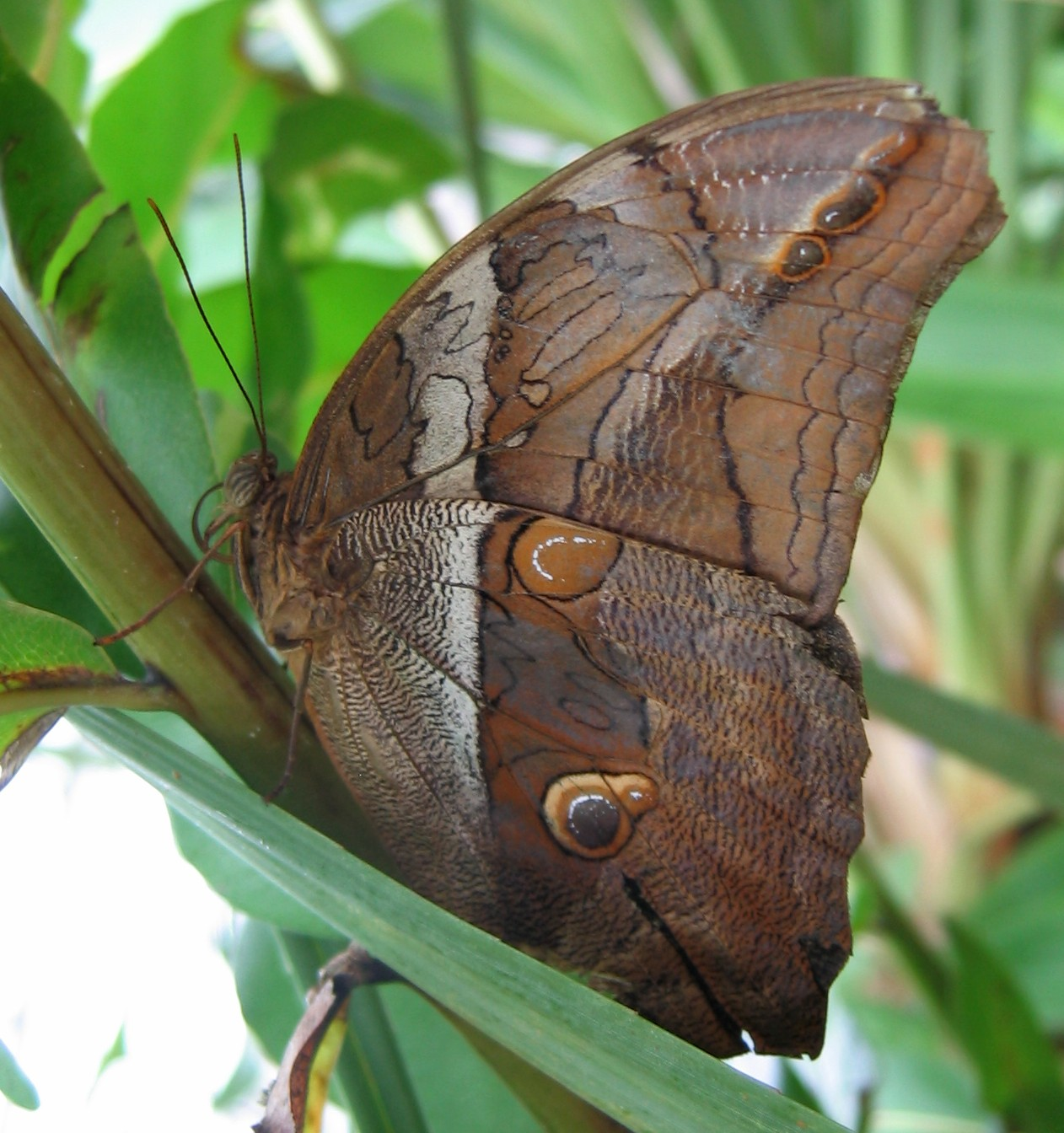 Eryphanis automedon Botanischer Garten München-Nymphenburg